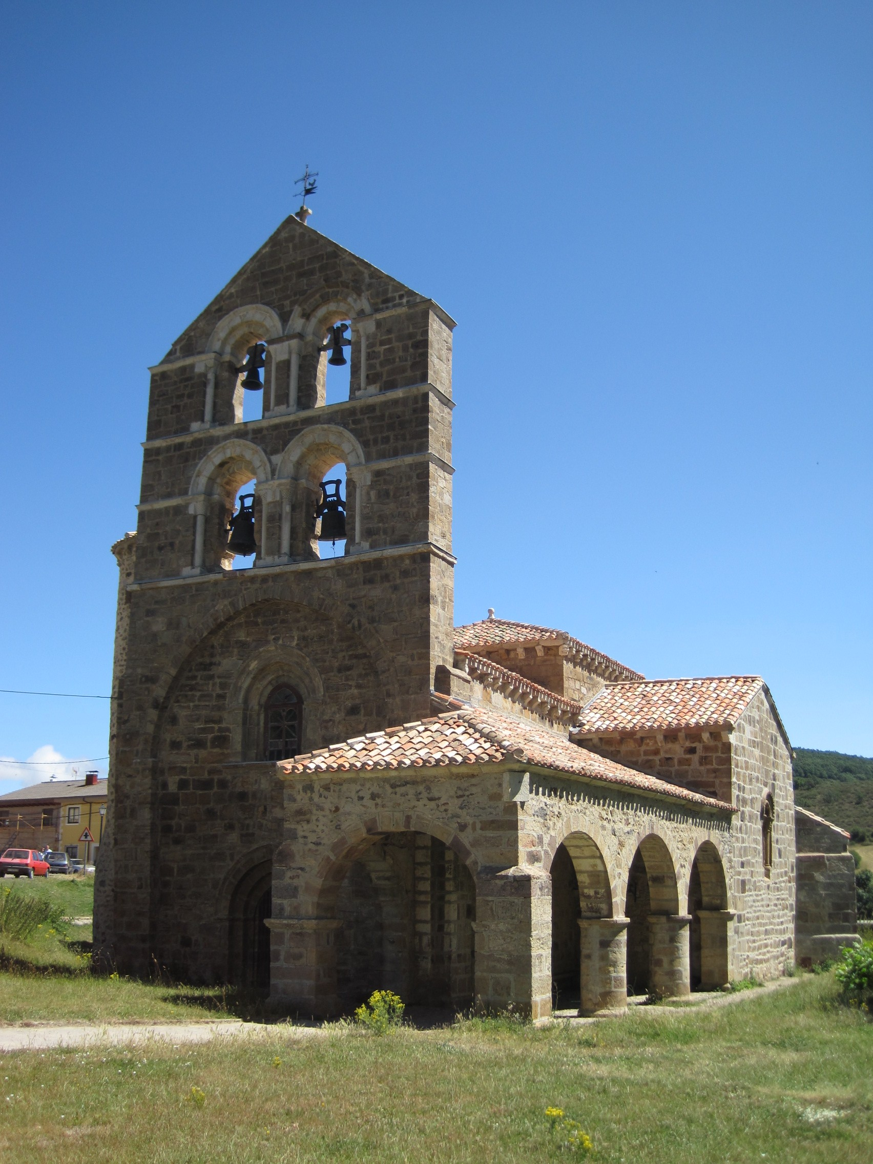 Vista de la iglesia de San Salvador de Cantamuda (Palencia, España).